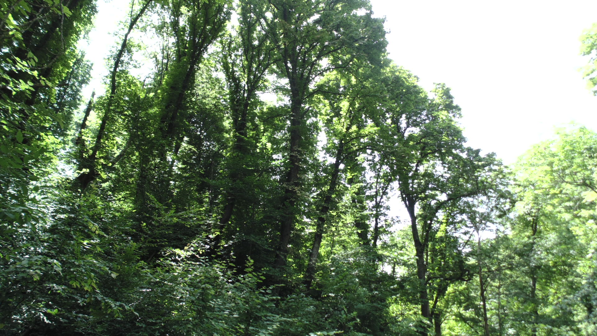 Растения от Дервиша